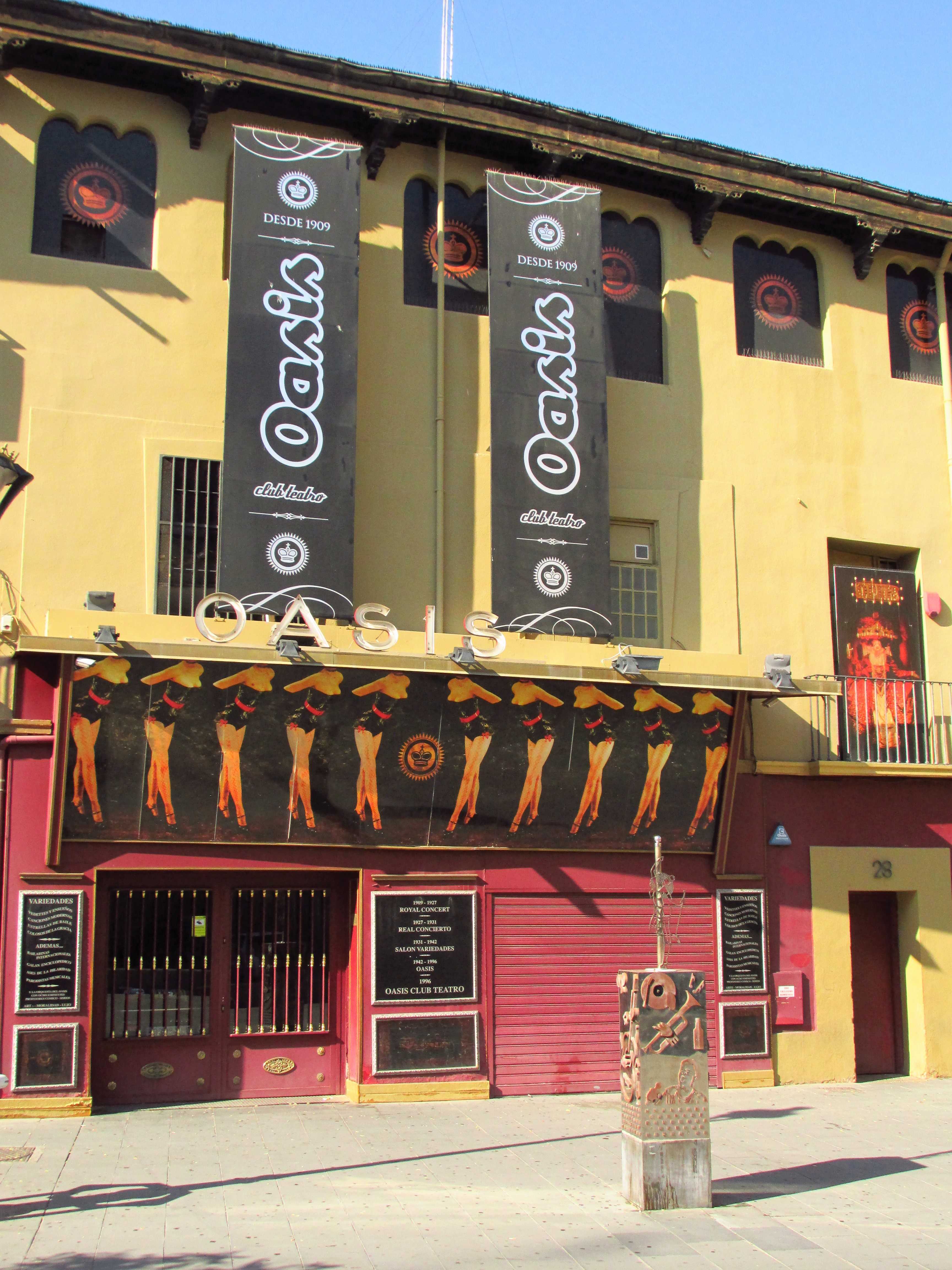 Sala Oasis Zaragoza.